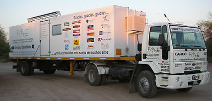 Camión Sanitario, de la Fundación Misión Esperanza, presidida por la Hermana Theresa Varela